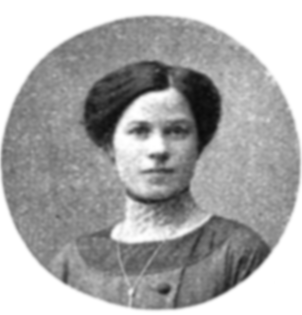 Författaren Kerstin Hed vid tiden för debuten 1913, ur Idun nr 44 1913.